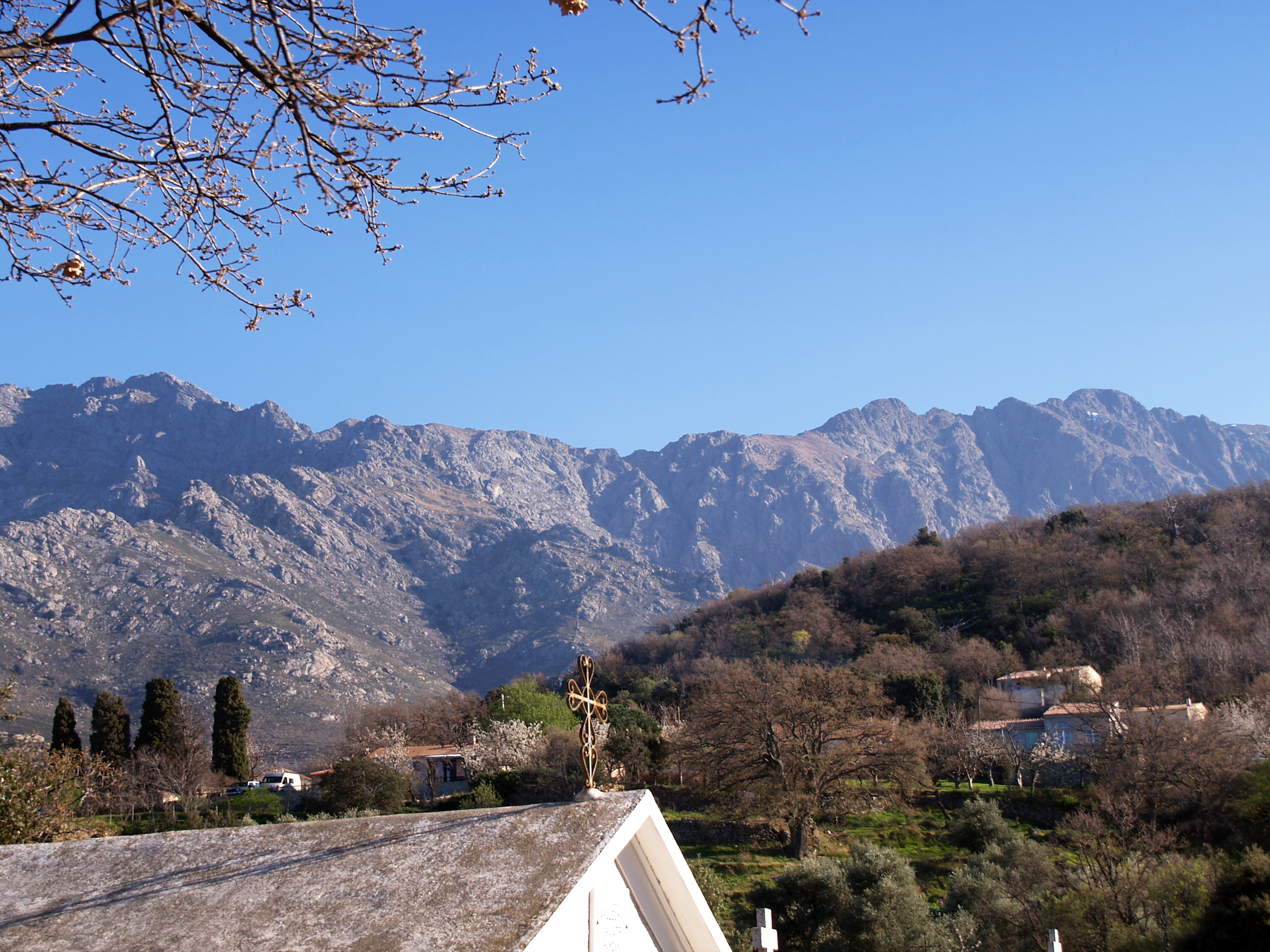 Muro, Balagne (Corse) - Hameau de Murato vu depuis le cimetière